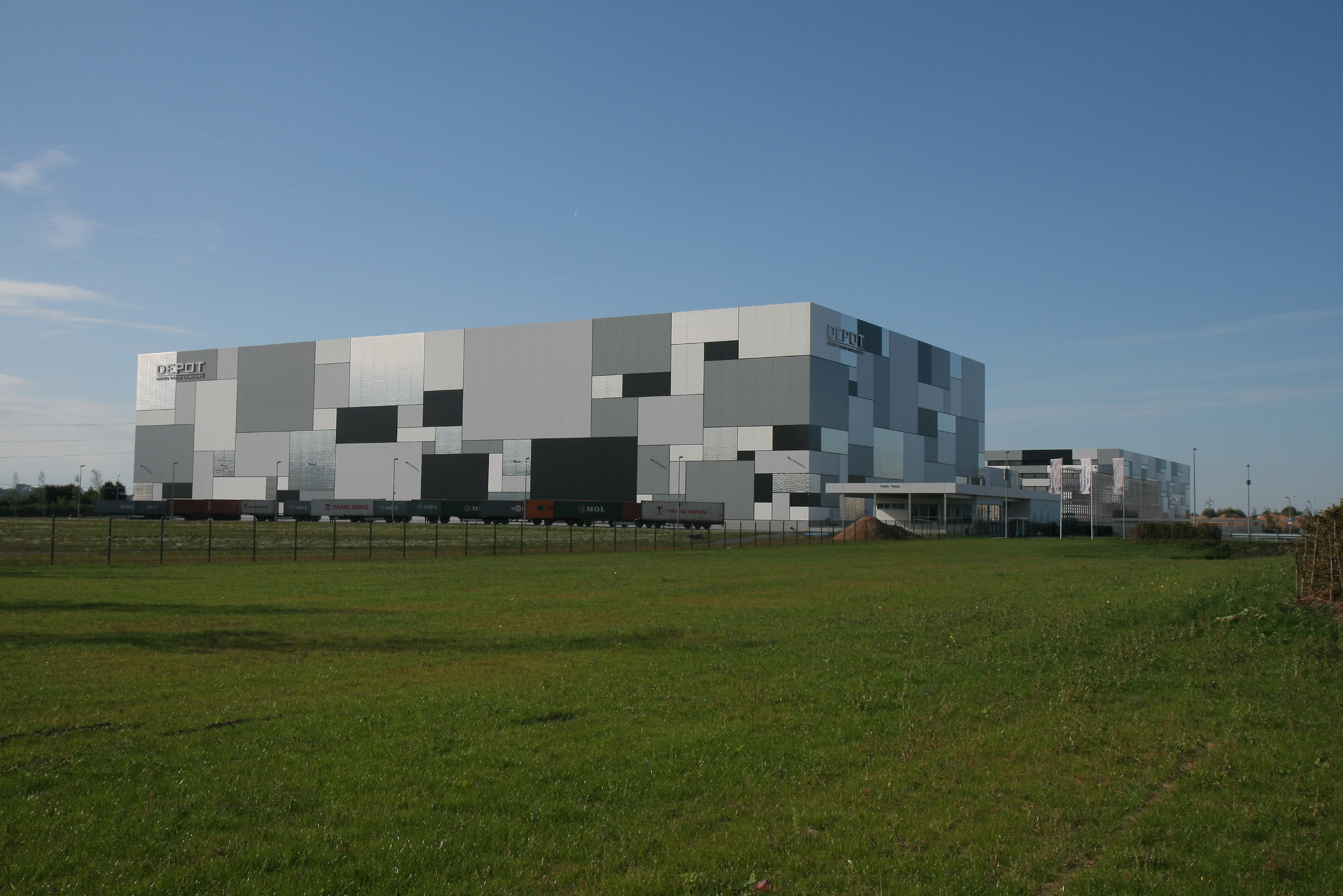 Gries Deco Company („Das Depot“) in Niedernberg. Standort der Unternehmenszentrale und Logistikzentrum mit Hochregallager.